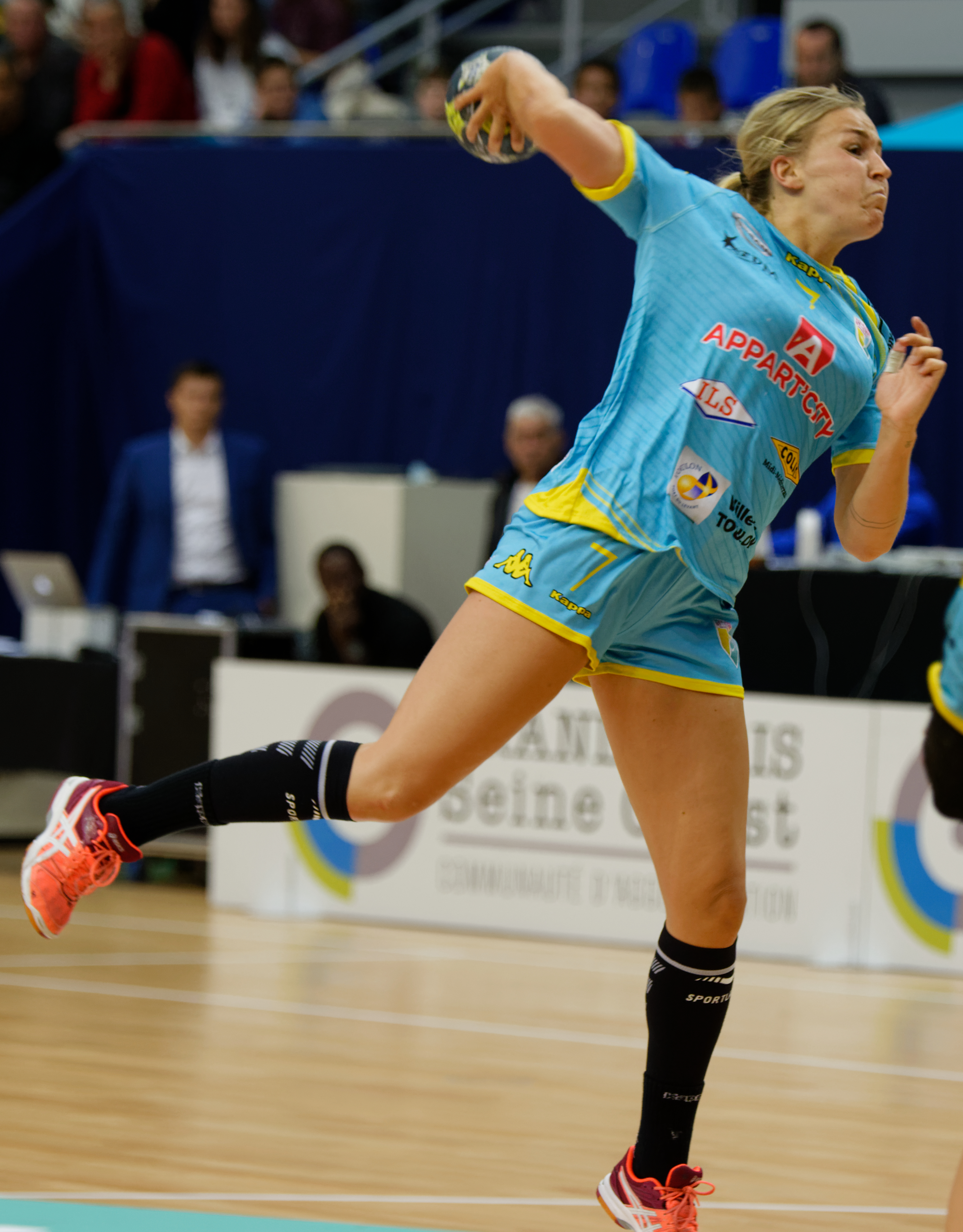 Rencontre de quart de finale retour des playoffs entre Issy Paris Hand et Toulon St Cyr. A Coubertin, le 7 mai 2017.